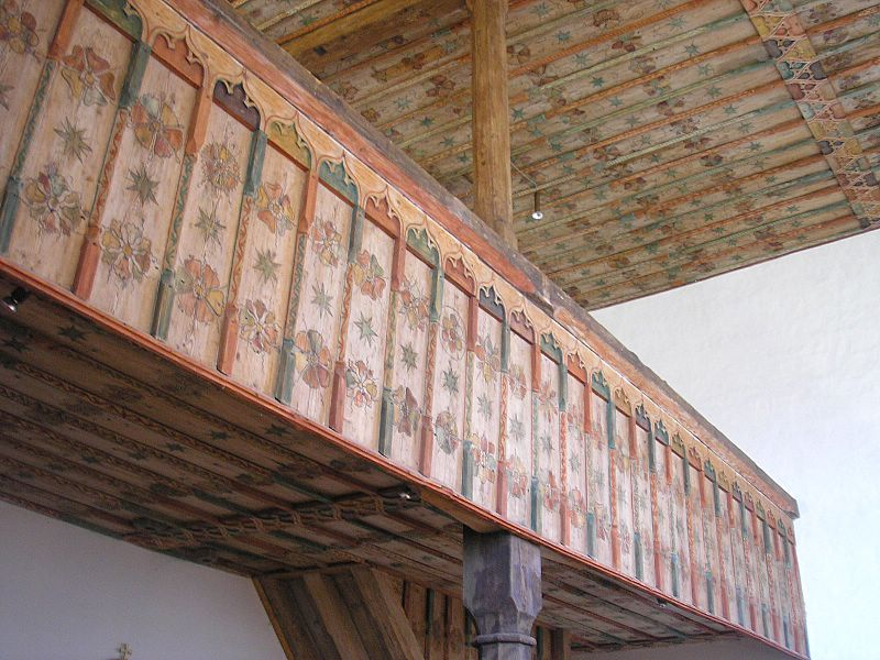 Wallfahrtskirche St. Willibald (Jesenwang, Landkreis Fürstenfeldbruck, Oberbayern). Empore und Balkendecke. Eigene Aufnahme, Okt. 2006 / Pilgrimage church St. Willibald at Jesenwang (Upper Bavaria, Germany). Gallery and cieling. Own photo, Oct. 2006